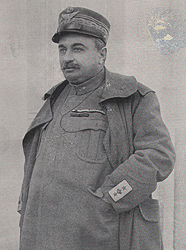 Generale Luigi Capello